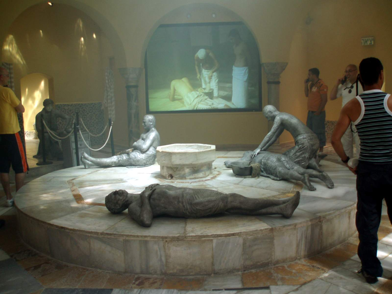 Hammam El Basha